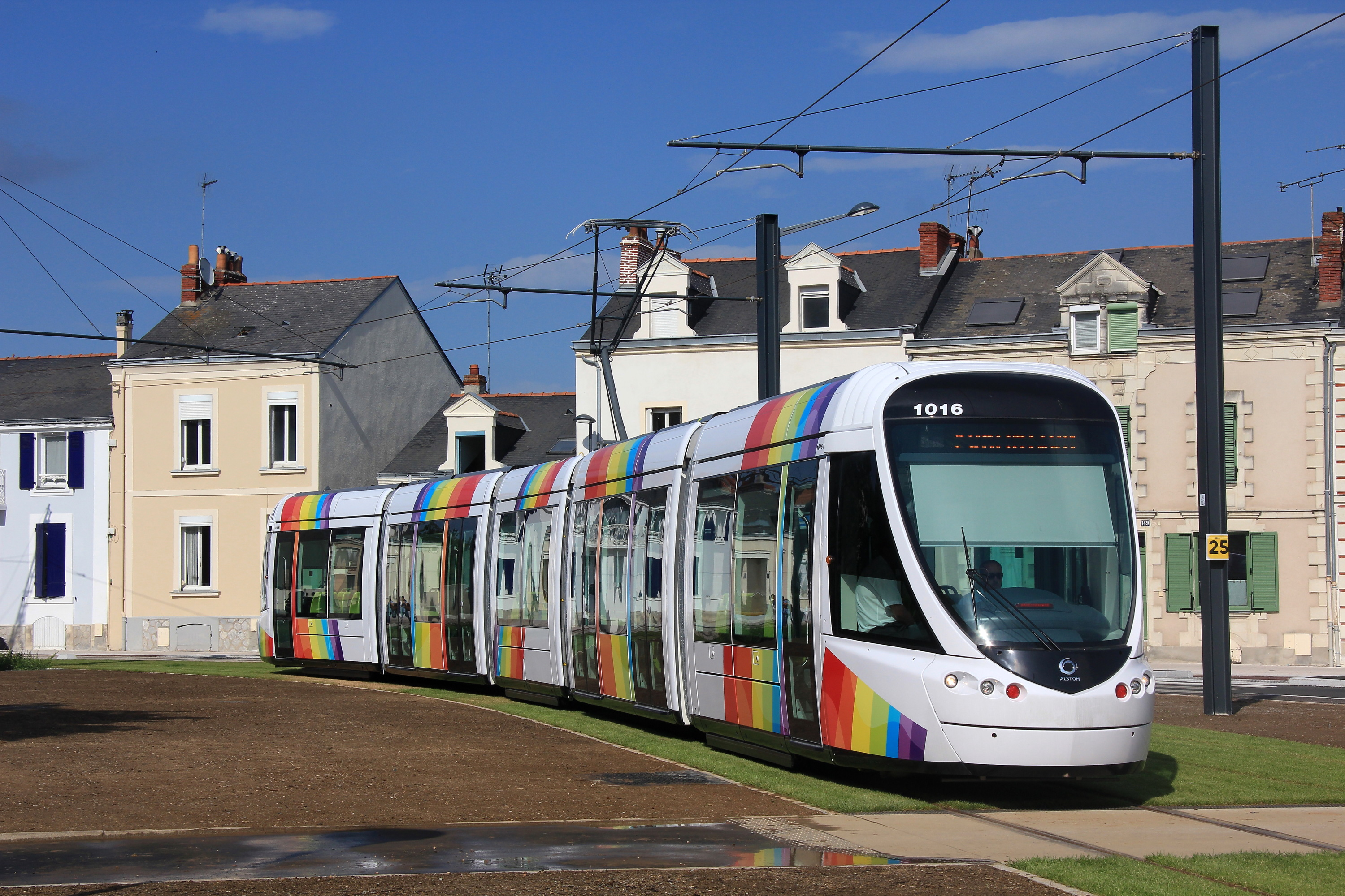 La rame Citadis n°1016 du tramway d'Angers quitte la rue de Létanduère pour s'engager sur le boulevard Churchill, lors de la marche à blanc une semaine avant la mise en service de la ligne. Le gazon est posé par plaques sur la voie et semé aux abords.